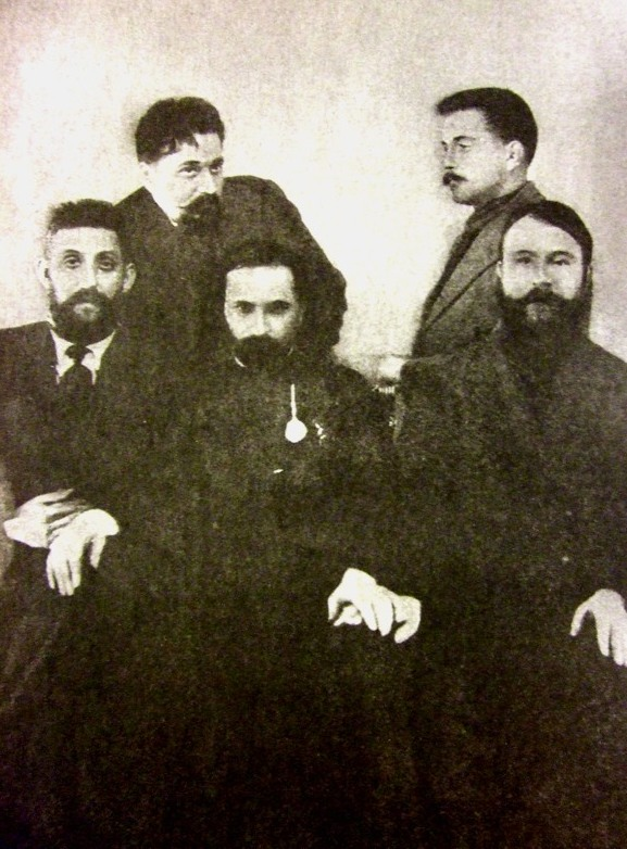 Георгий Гапон с группой рабочих накануне 9-го января 1905 г. Сидят: Иноземцев, Гапон, Филиппов. Стоят: Янов и Климов.